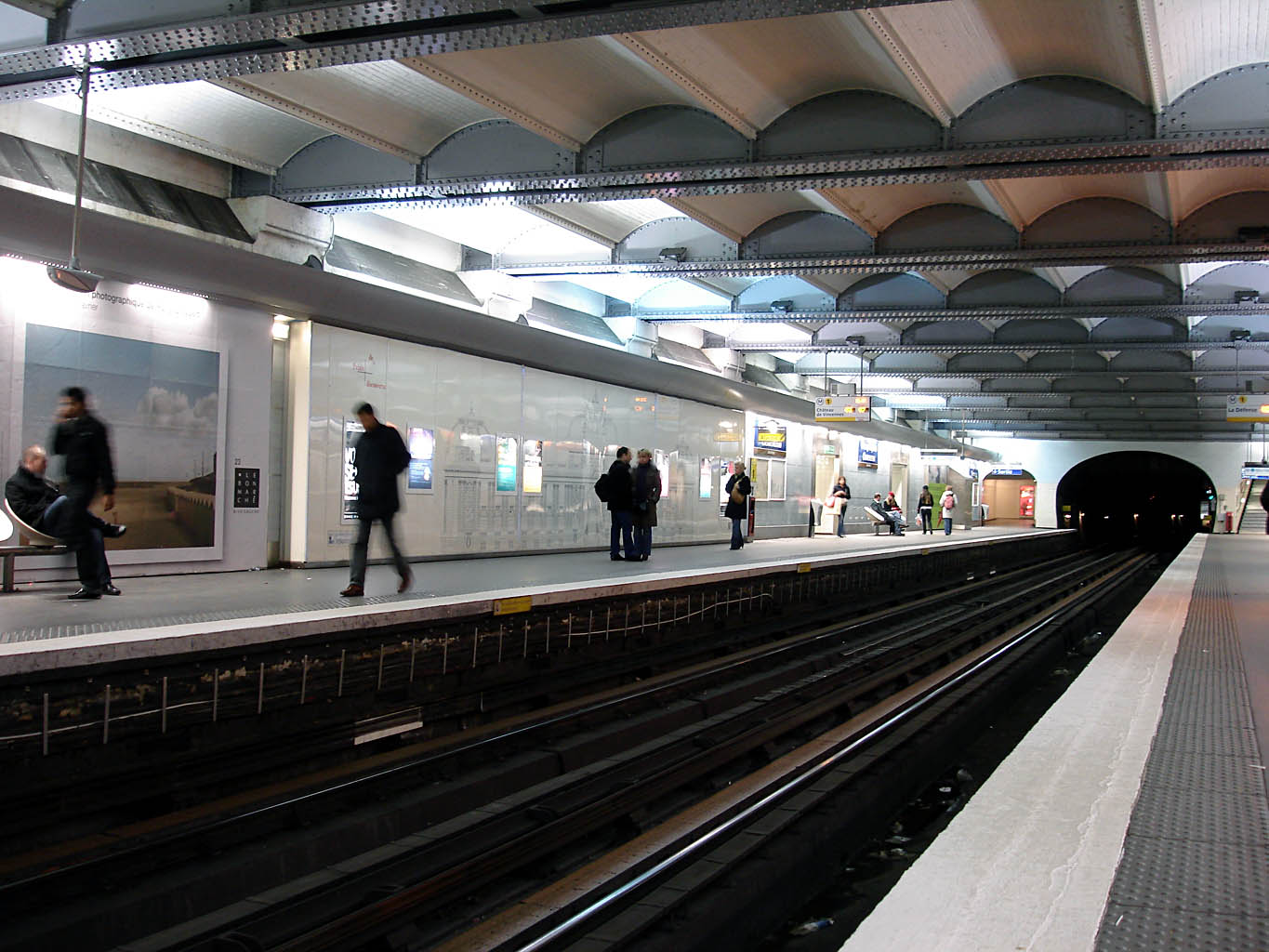 Métro de Paris (France) - ligne 1 - Station Champs-Elysées - Clemenceau